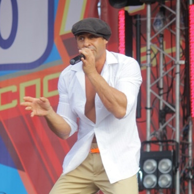 Лужники день города Есть исходник